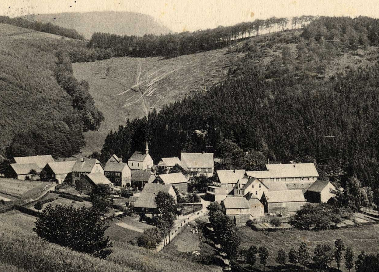 Nordenau (Schmallenberg), Anno 1914, in Germany.